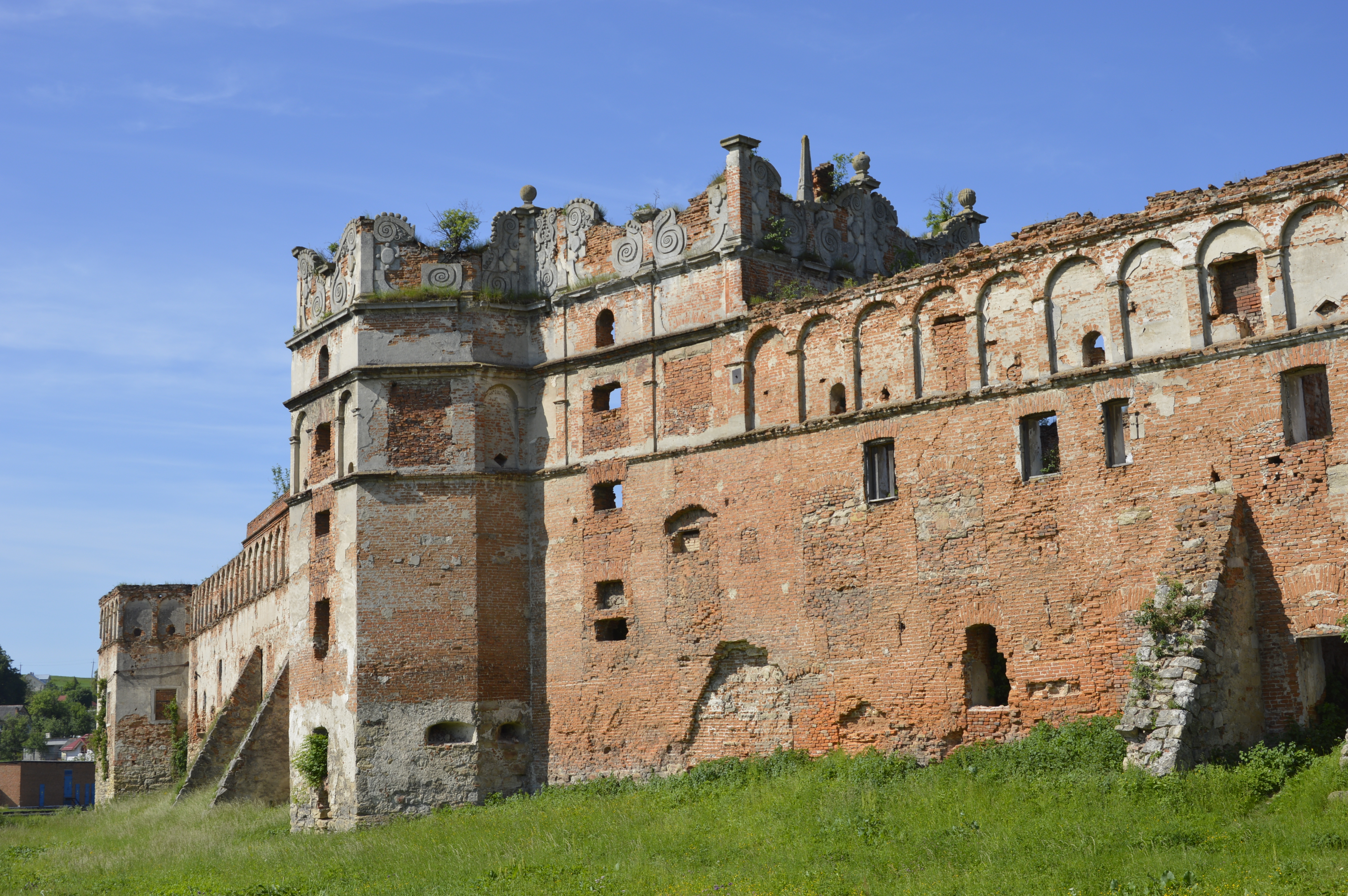 Замок, Старе Село